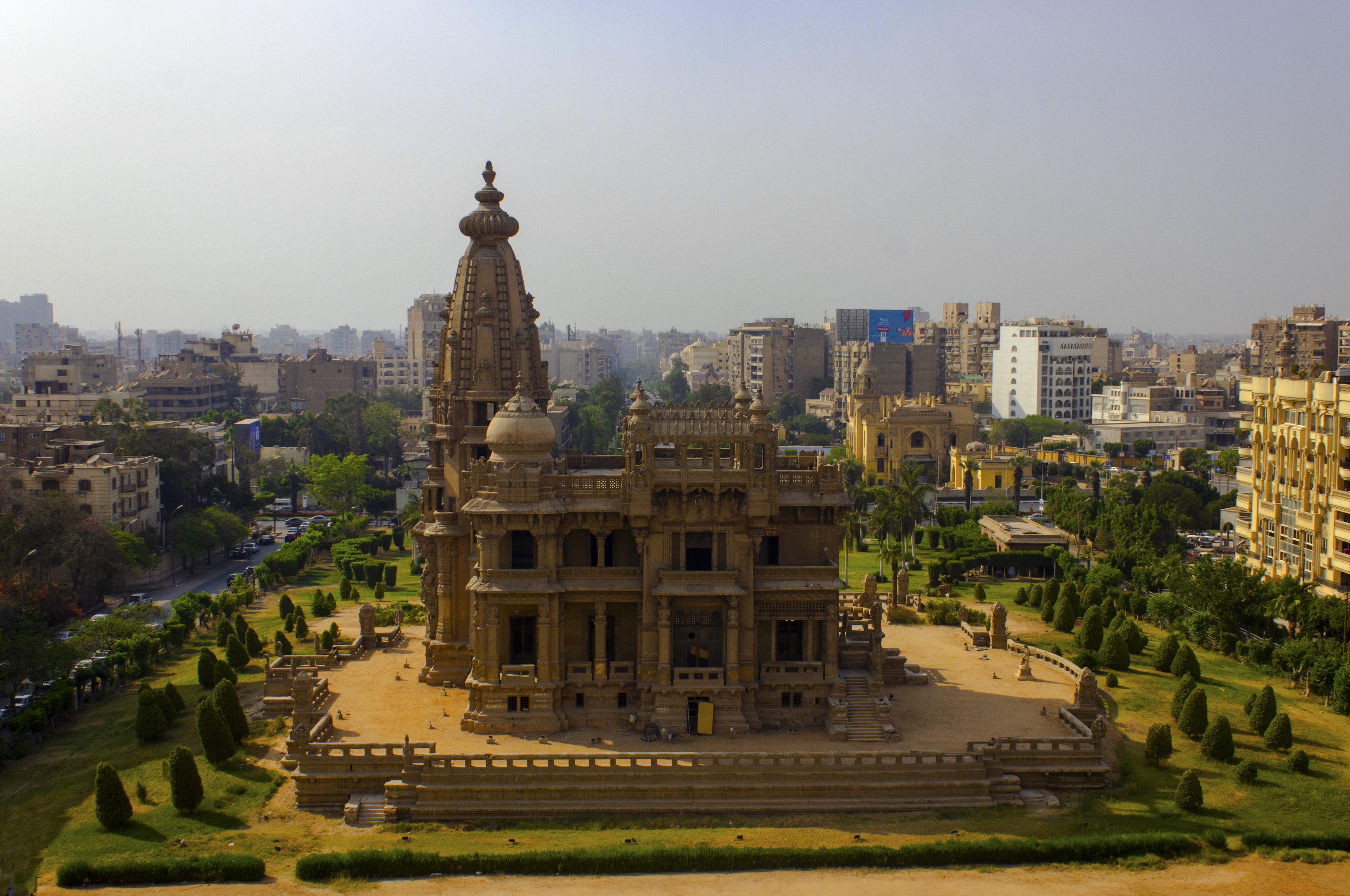 مبني حديث